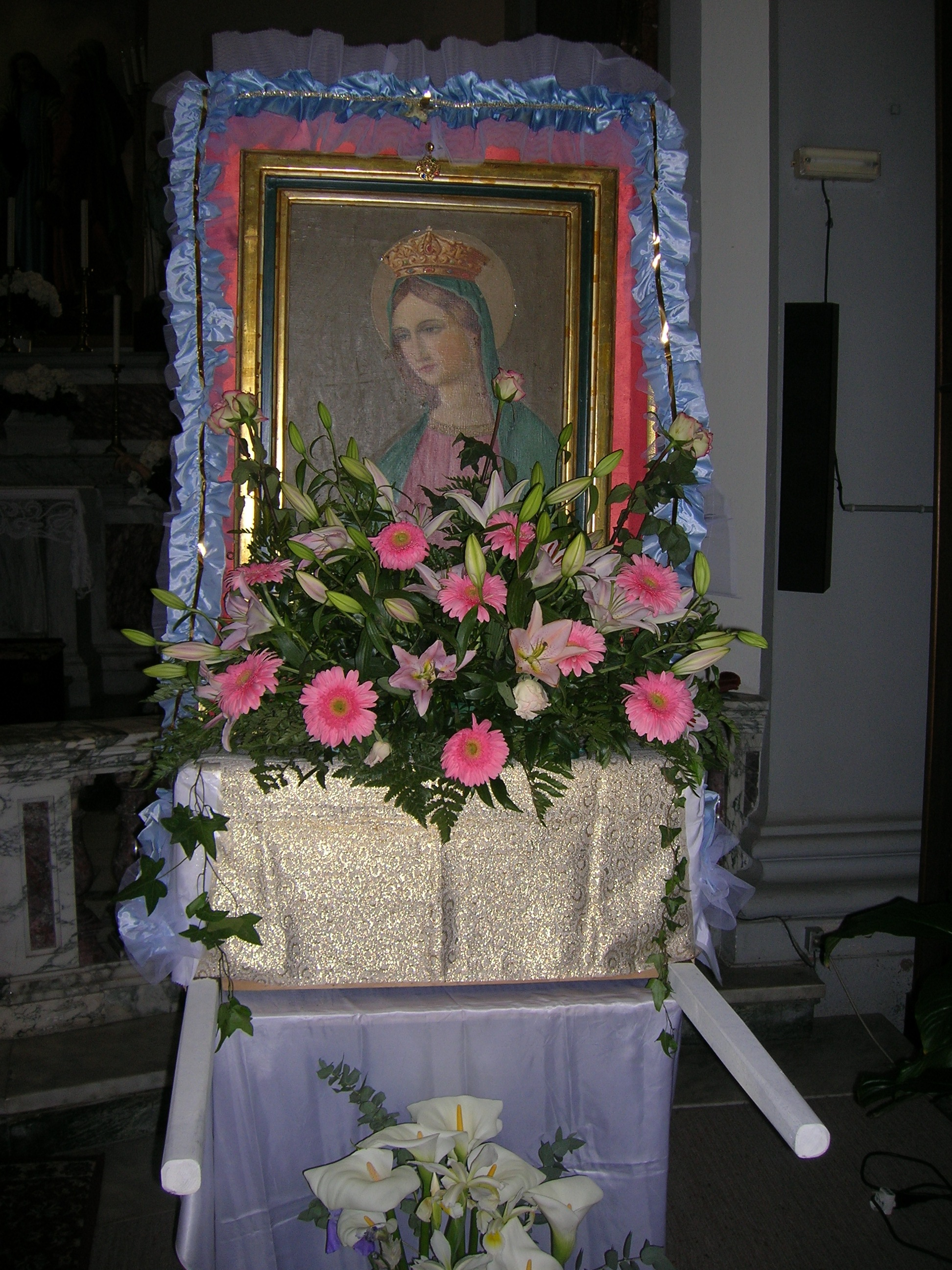 Baldacchino della processione patronale di Uliveto Terme